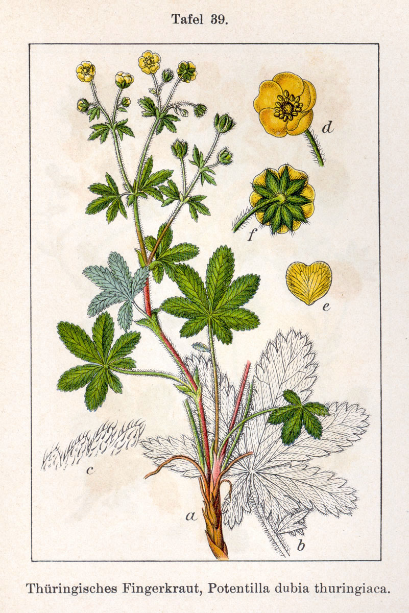 Thüringisches Fingerkraut, Potentilla thuringiaca Bernh. ex Link Original Description Thüringisches Fingerkraut, Potentilla dubia thuringiaca